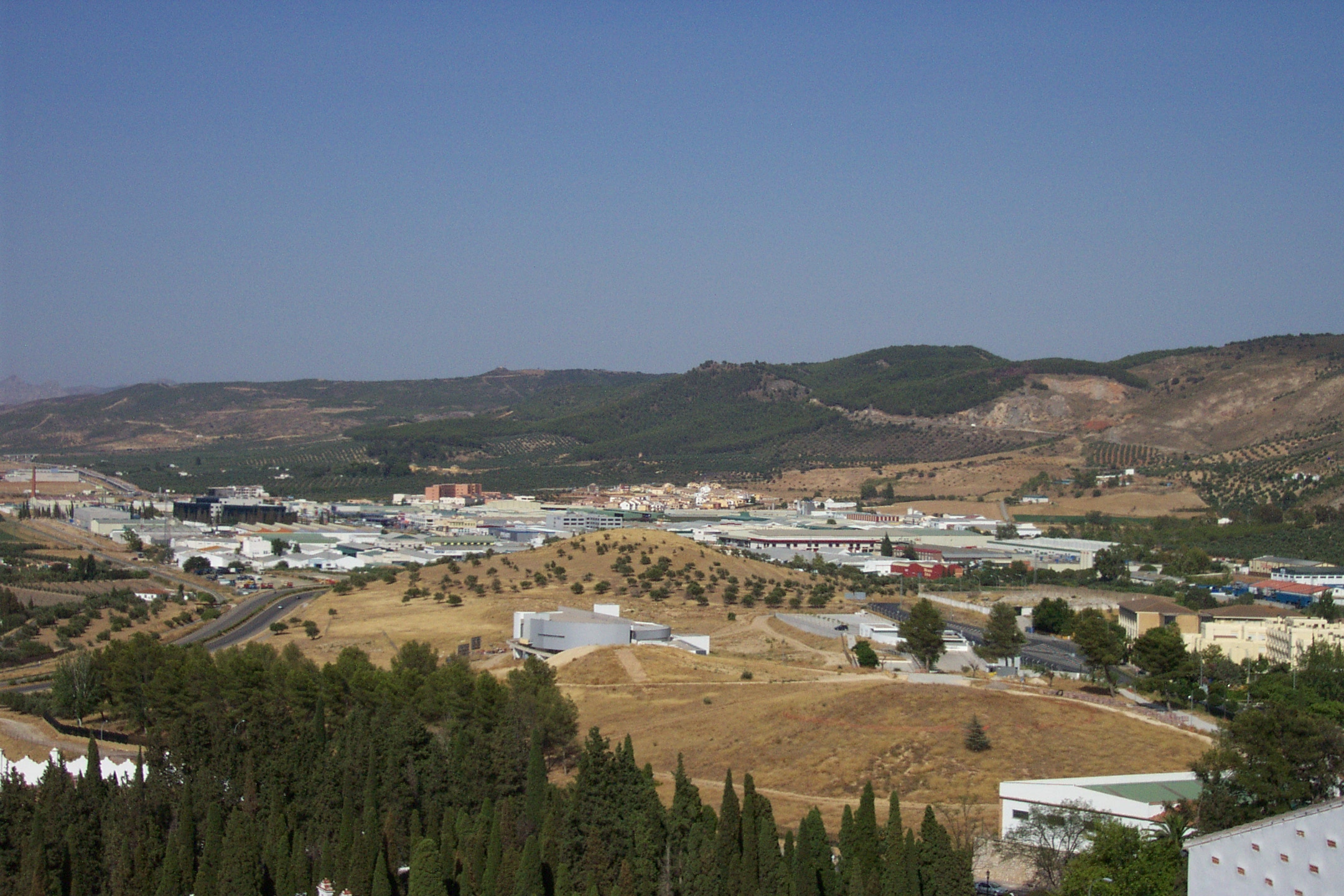 Dolmen of Menga, Antequera, Spain.